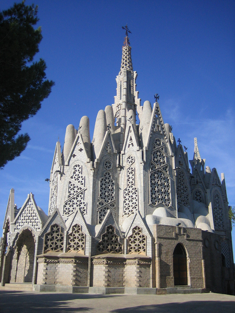 Santuari modernista d'en Josep Mª Jujol i Gibert iniciat el 15 de novembre de 1925